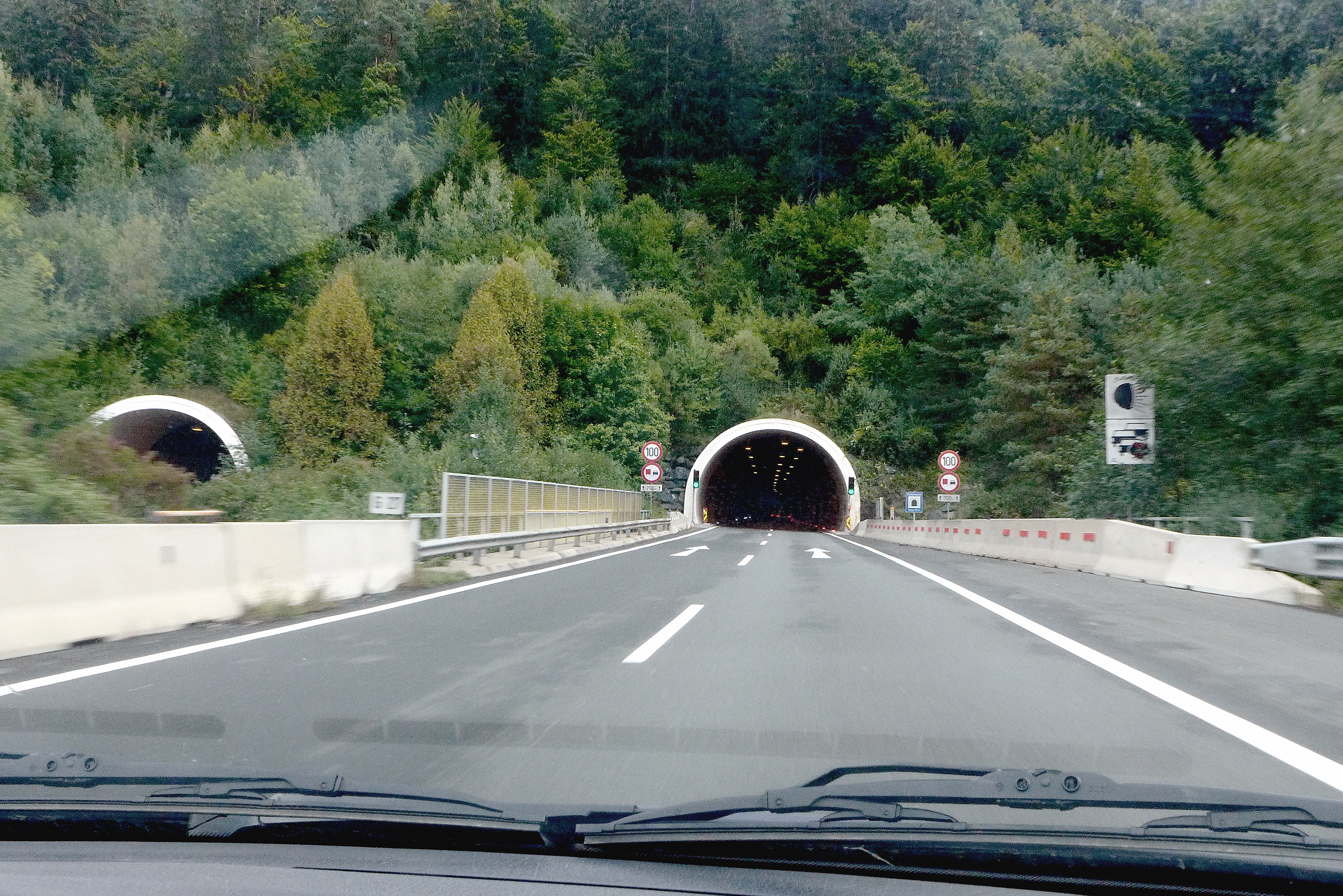 Nyugati alagútkapu a Pack-hágó alatt (A2-es autópálya, Ausztria)